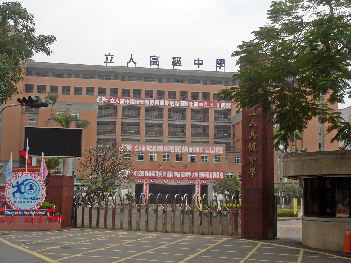 臺中市私立立人高級中學。